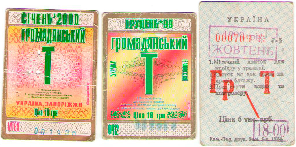 Місячні квитки для проїзду в трамваях Запоріжжя на січень 2000-го, грудень 1999-го і жовтень 1999-го року.